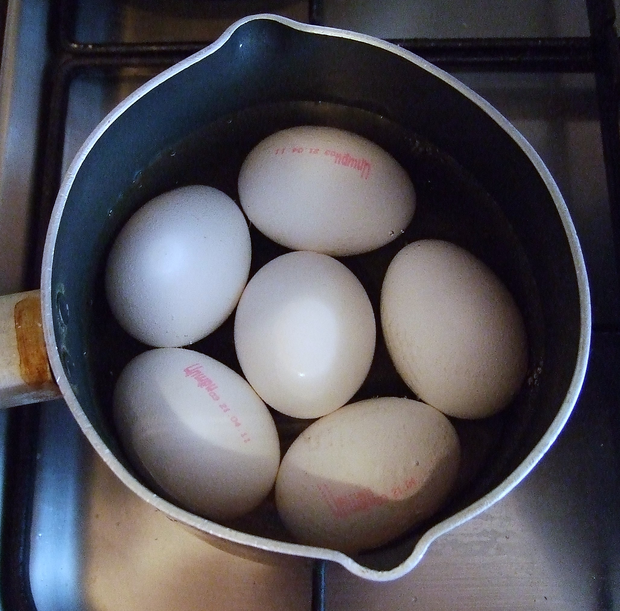 Հաւկիթների խաշելը